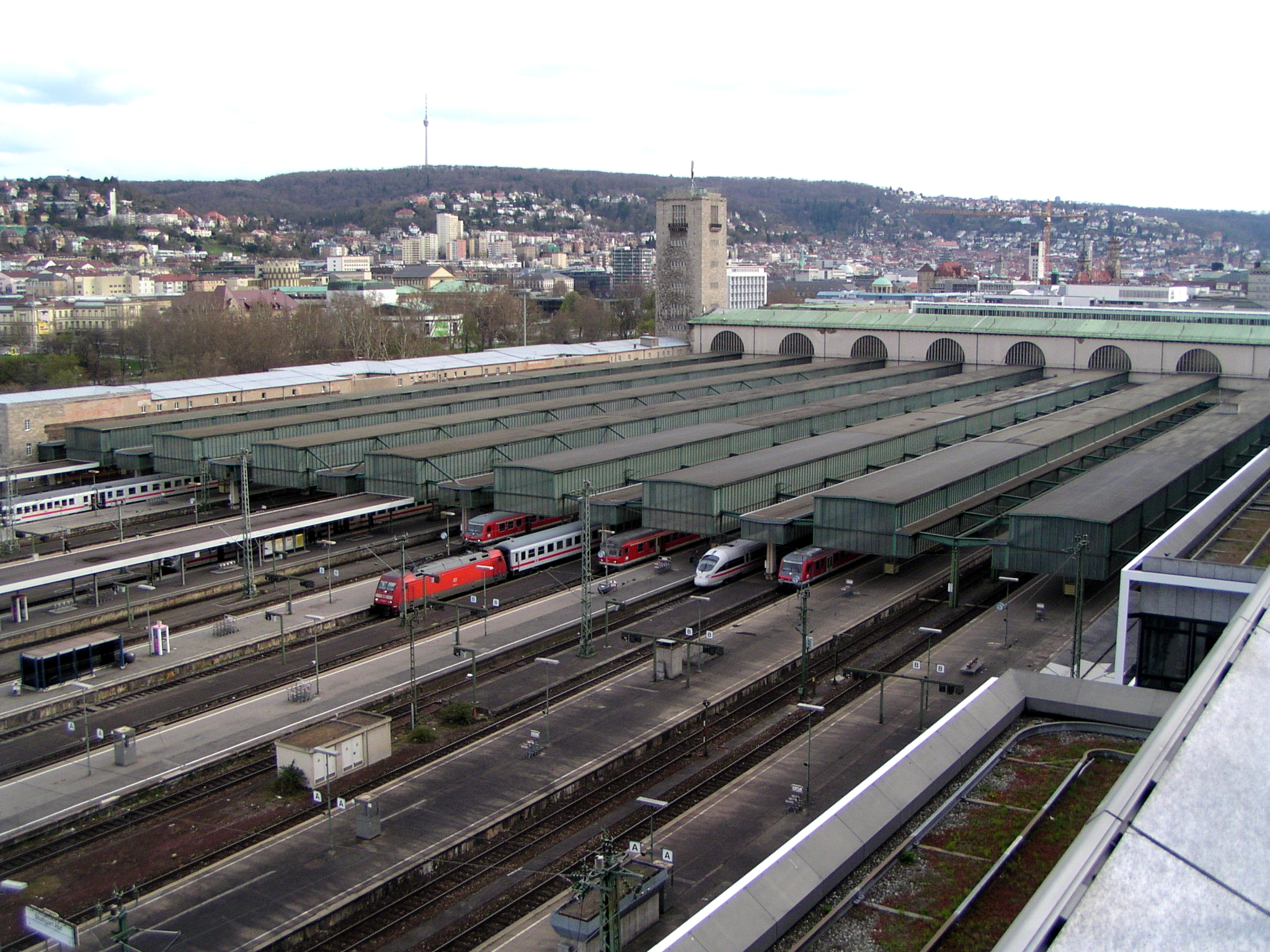 Blick auf die Rückseite des Stuttgarter Bahnhofs von der Dachterrasse des Sparkassenverbandsgebäudes im März 2008